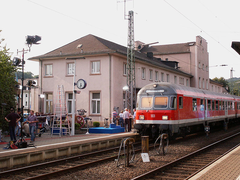 Bahnhof Dillenburg vor Aufzeichnung der hr-Sendung "Bahnhof live".